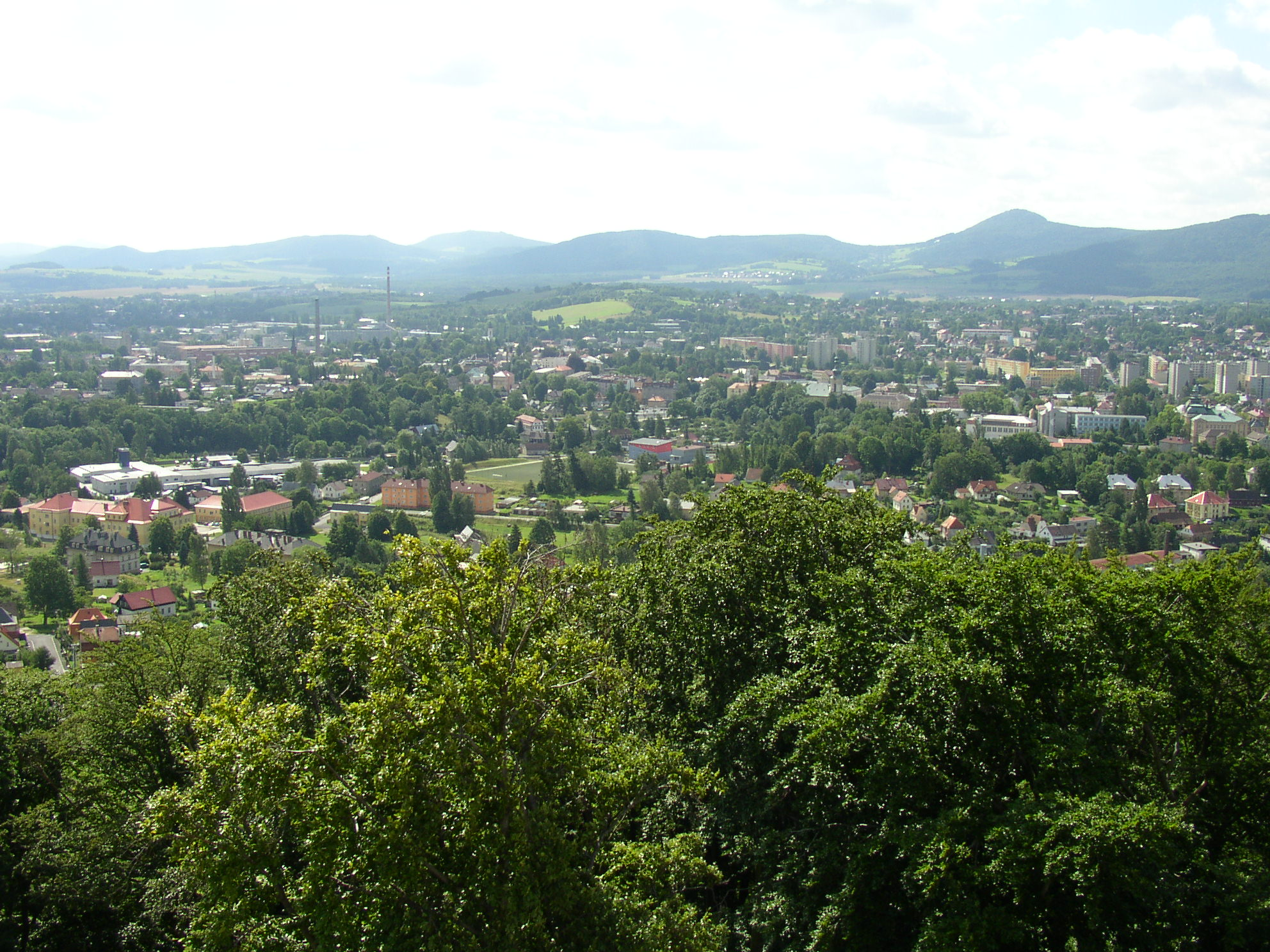 Pohled na Varnsdorf z výletní restaurace na Hrádku